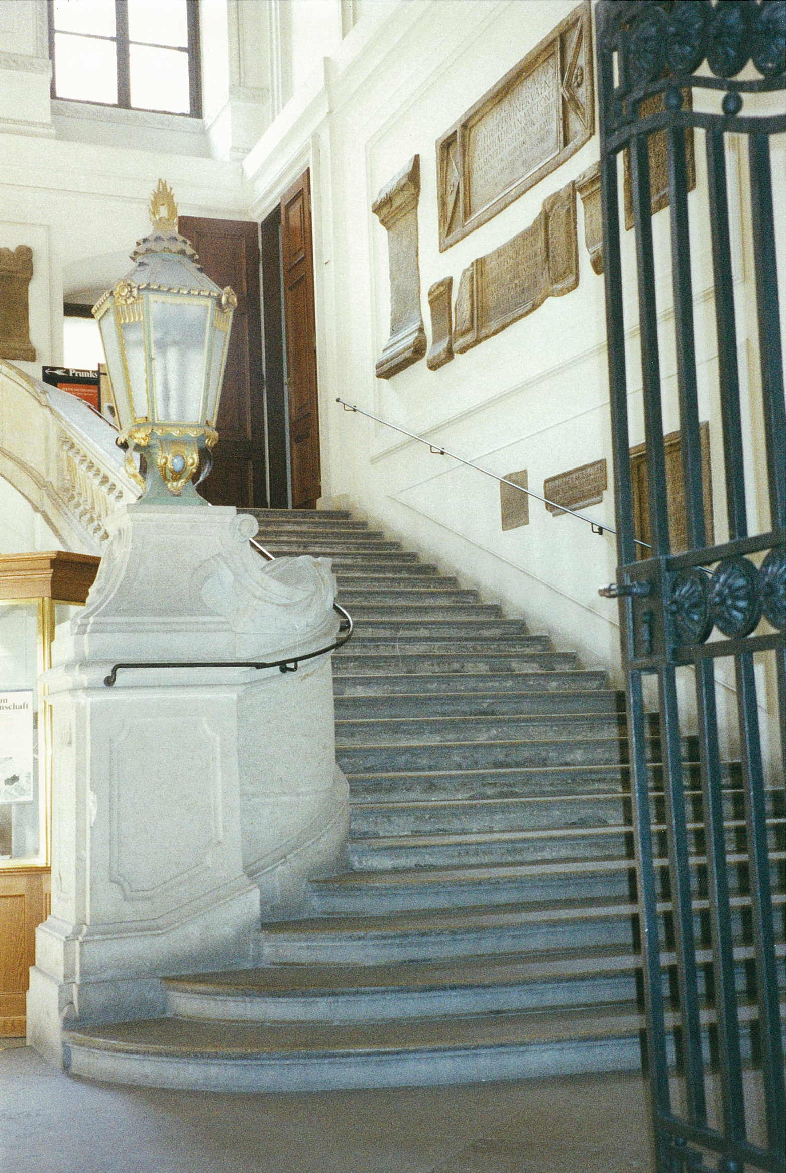 Treppe_zum_Prunksaal